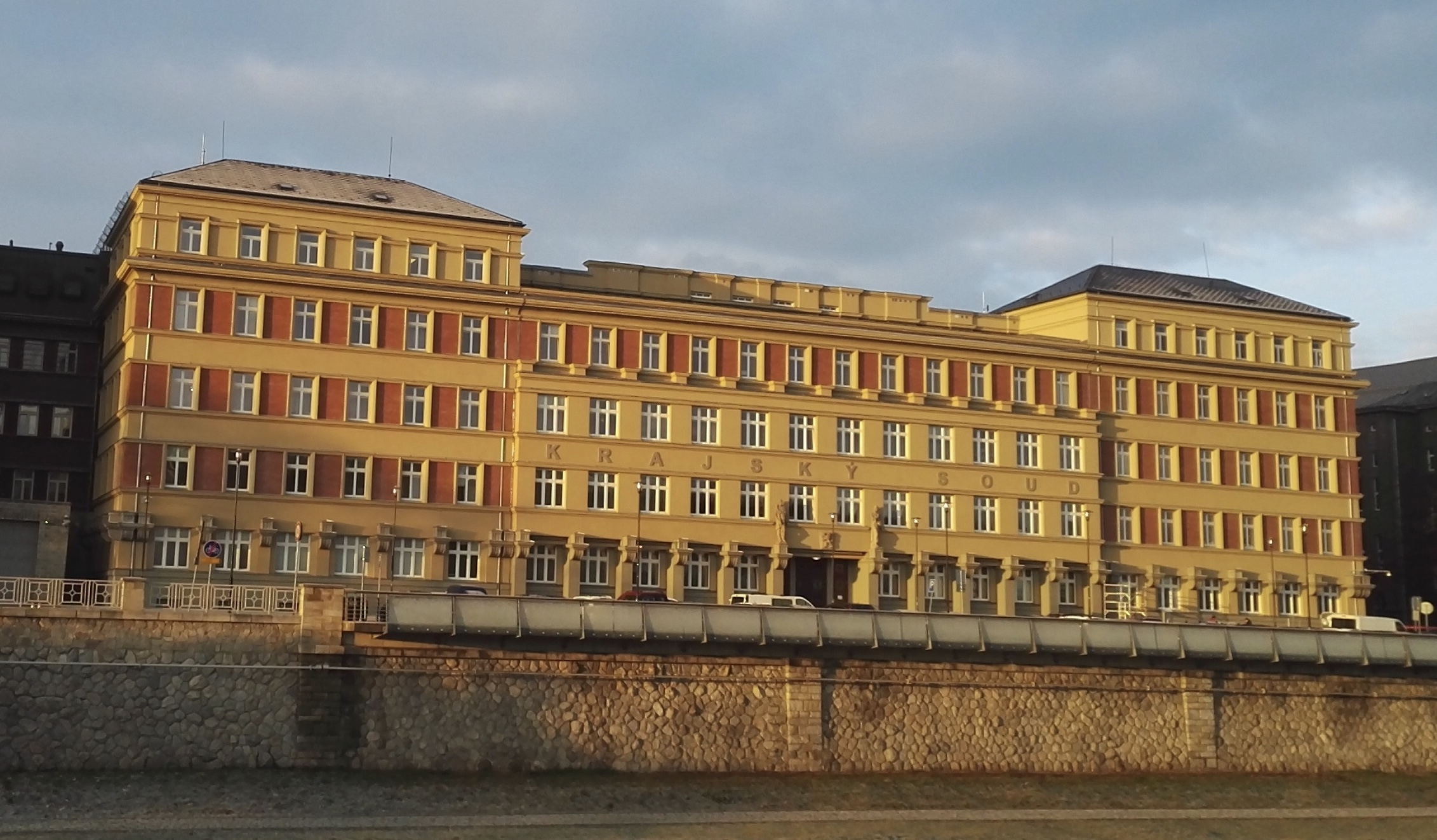 Krajský soud v Ostravě (obnovená fasáda v roce 2019)